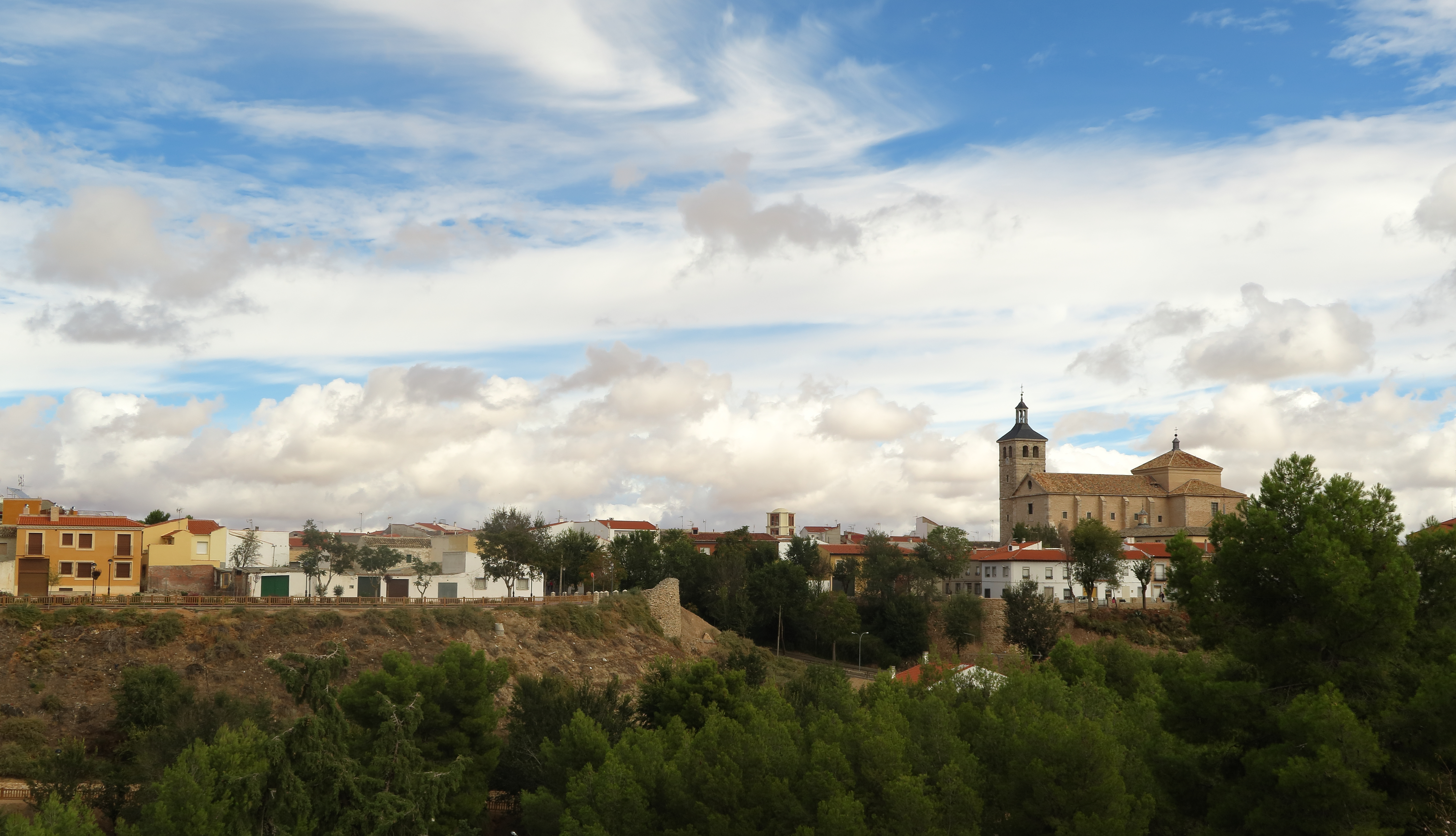 La Guardia, Toledo, vista de la población